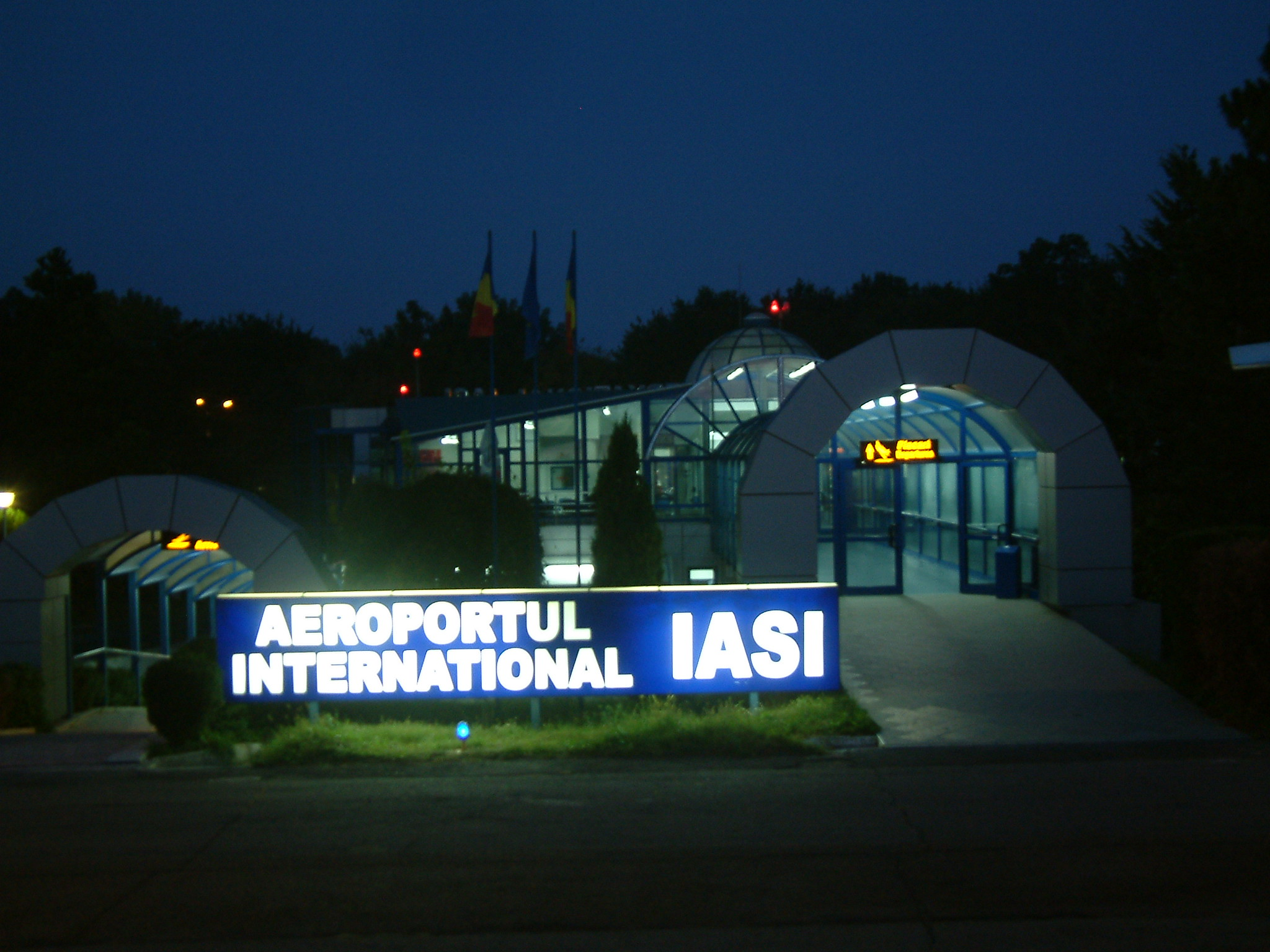 Aeroportul_int_ias